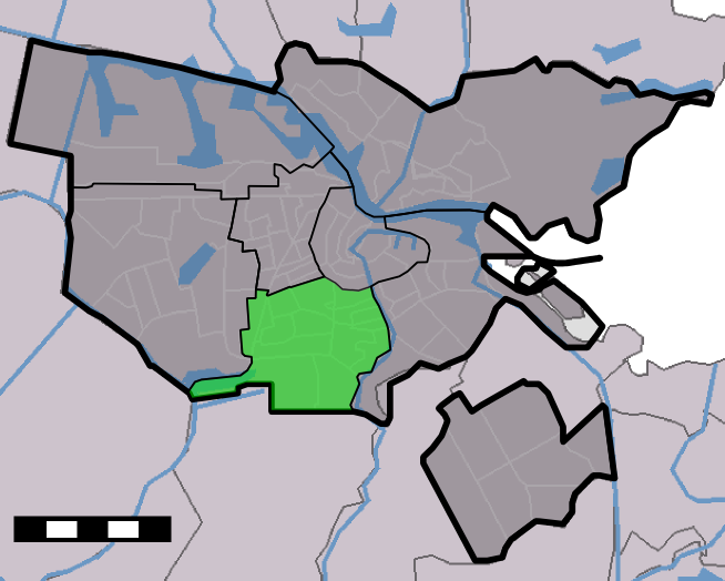 Stadsdeel Zuid (2010)